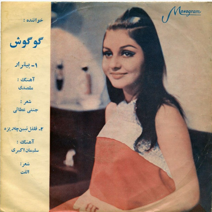 جلد آلبومی از گوگوش - بیقرار - فلفل نبین چه ریزه